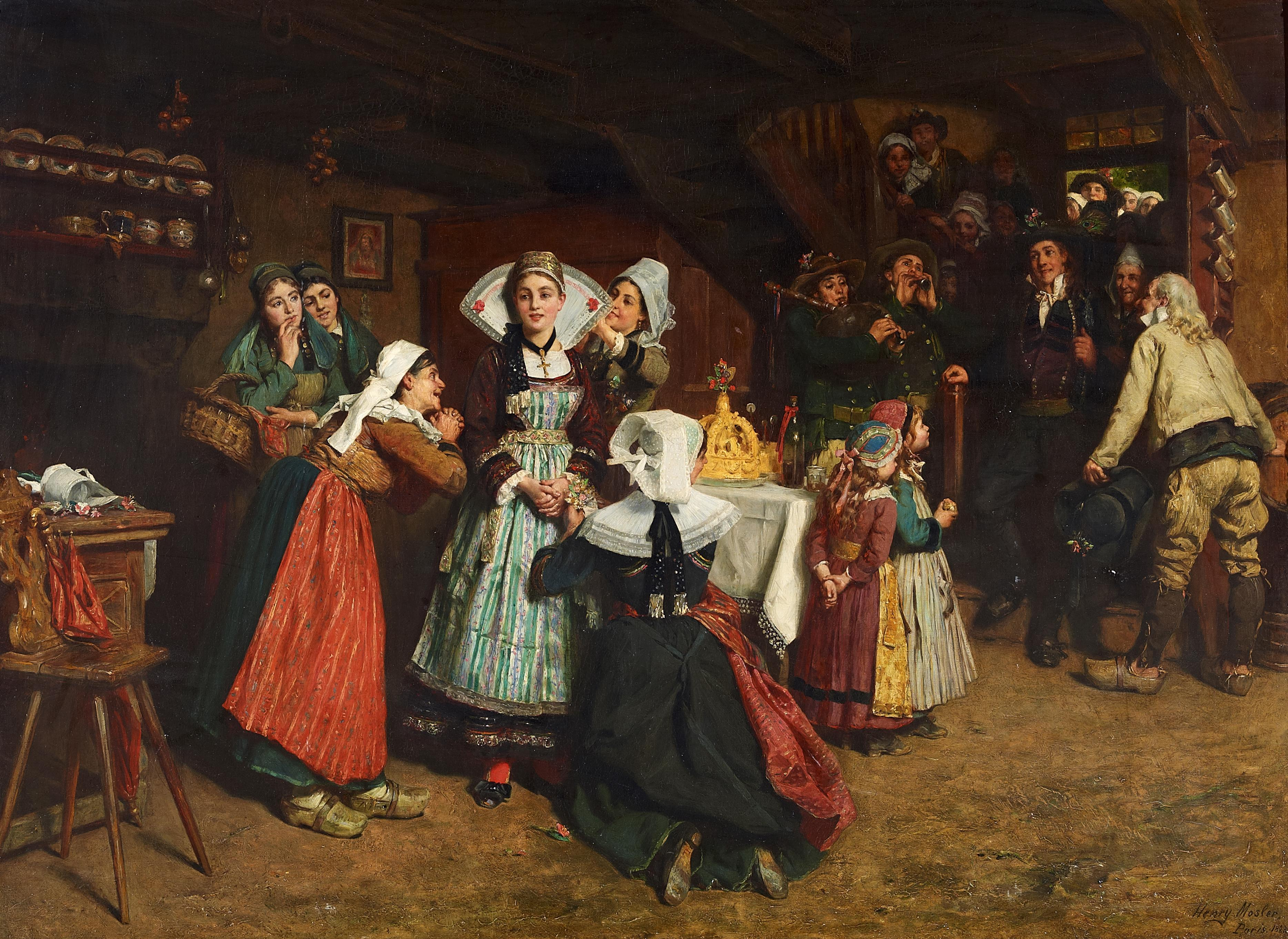 "Am Hochzeitsmorgen (Brautschmückung)". Signiert und datiert unten rechts: Henry Mosler. Paris 1883. Öl auf Leinwand. 116,5 x 159 cm.